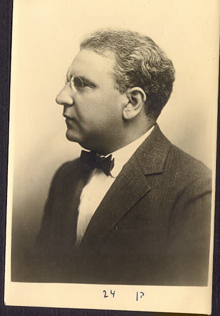 Dr. Haim Harai (Blumberg) (1886-1940), 1907, Eretz Yisrael This work or image is now in the public domain because its term of copyright has expired in Israel. According to Israel's copyright statute from 2007 (translation), a work is released to the public domain on 1 January of the 71st year after the author's death (paragraph 38 of the 2007 statute) with the following exceptions: A photograph taken on 24 May 2008 or earlier — the old British Mandate act applies, i.e. on 1 January of the 51st year after the creation of the photograph (paragraph 78(i) of the 2007 statute, and paragraph 21 of the old British Mandate act). If the copyrights are owned by the State, not acquired from a private person, and there is no special agreement between the State and the author — on 1 January of the 51st year after the creation of the work (paragraphs 36 and 42 in the 2007 statute). See also category: PD Israel & British Mandate.